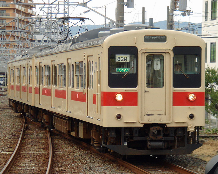 紀勢線和歌山駅に進入するの国鉄105系電車（クモハ105形500番台）